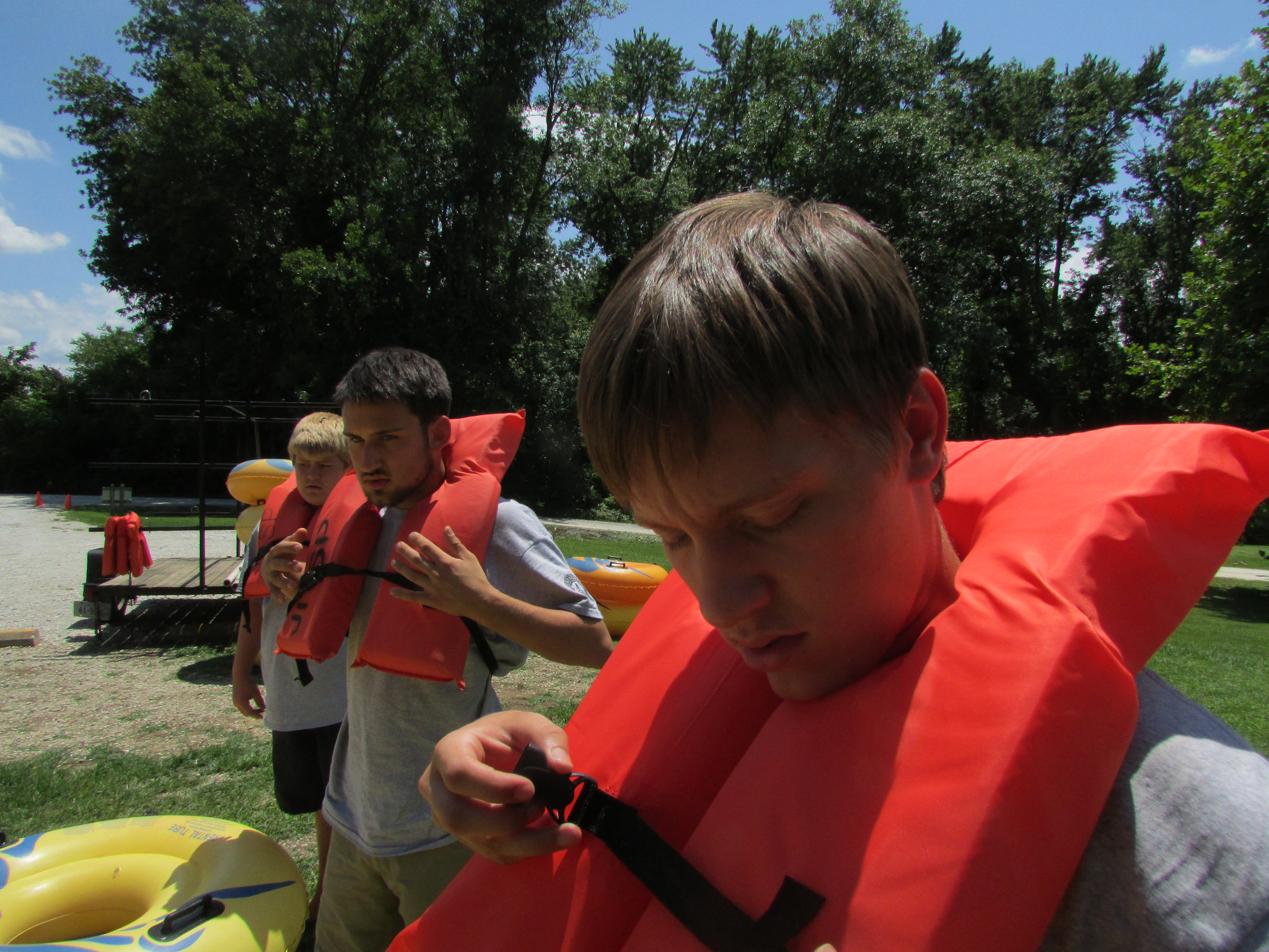 park